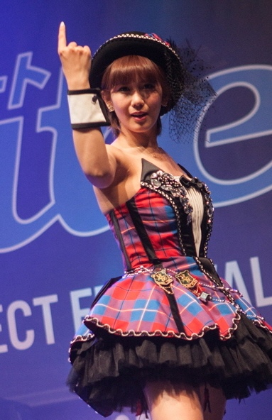 Berryz Kobo x °C-ute